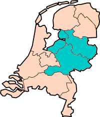 Locatiekaart van NUTS2: Oost-Nederland.